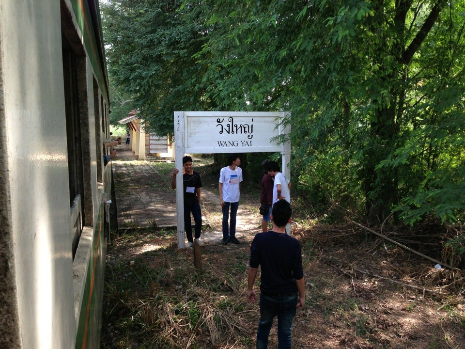 ภาพนักท่องเที่ยว กับป้ายสถานีรถไฟ